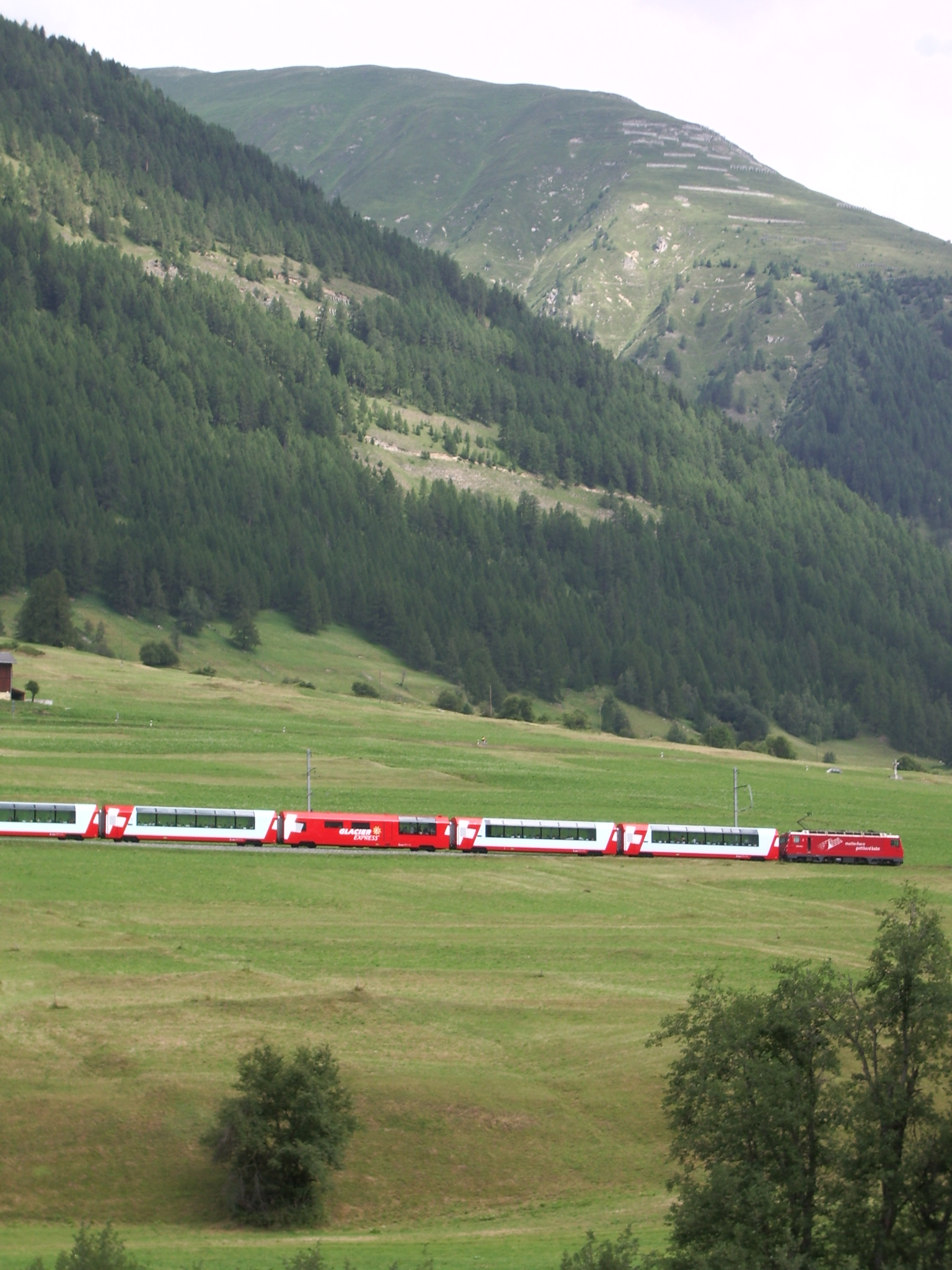 Der Glacier-Express bei Münster VS im Goms Kanton Wallis mit den im Jahre 2006 in Verkehr gesetzten neuen Panoramawagen. Bild selbst im Sommer 2006 aufgenommen.